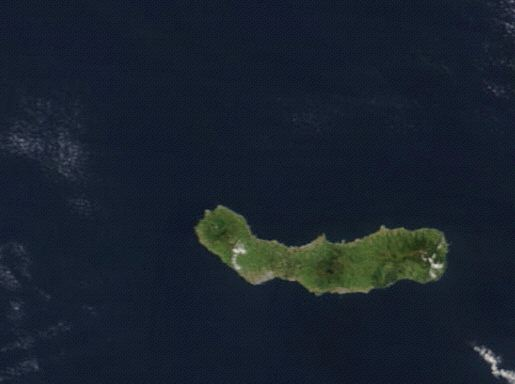 São Miguel Island